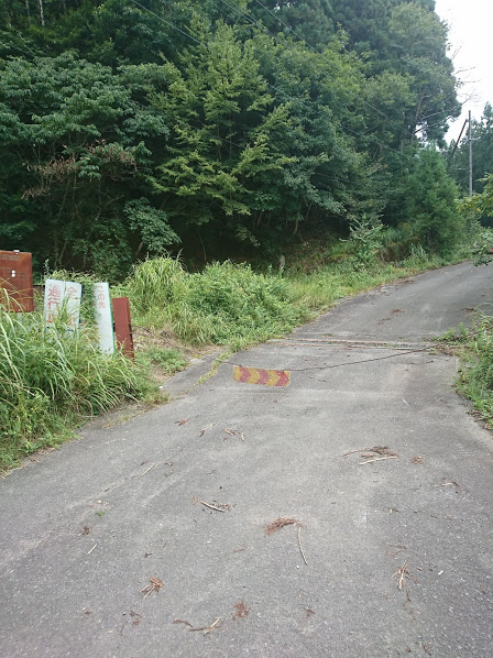 国道477号線から見た大原花背線のの終点。封鎖されている。